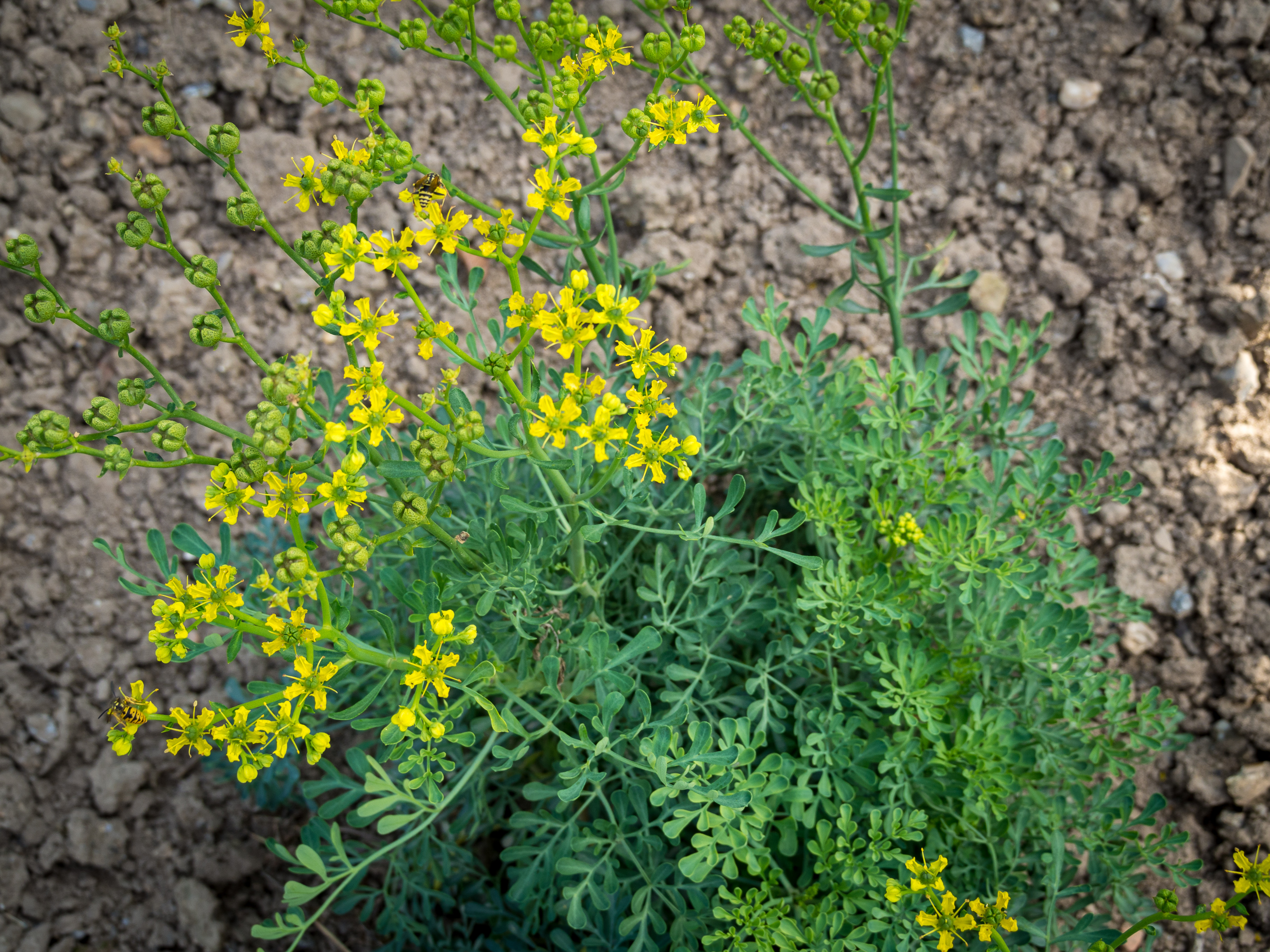 Weinraute, lat. Ruta graveolens, Pflanze mit den gelben Blüten